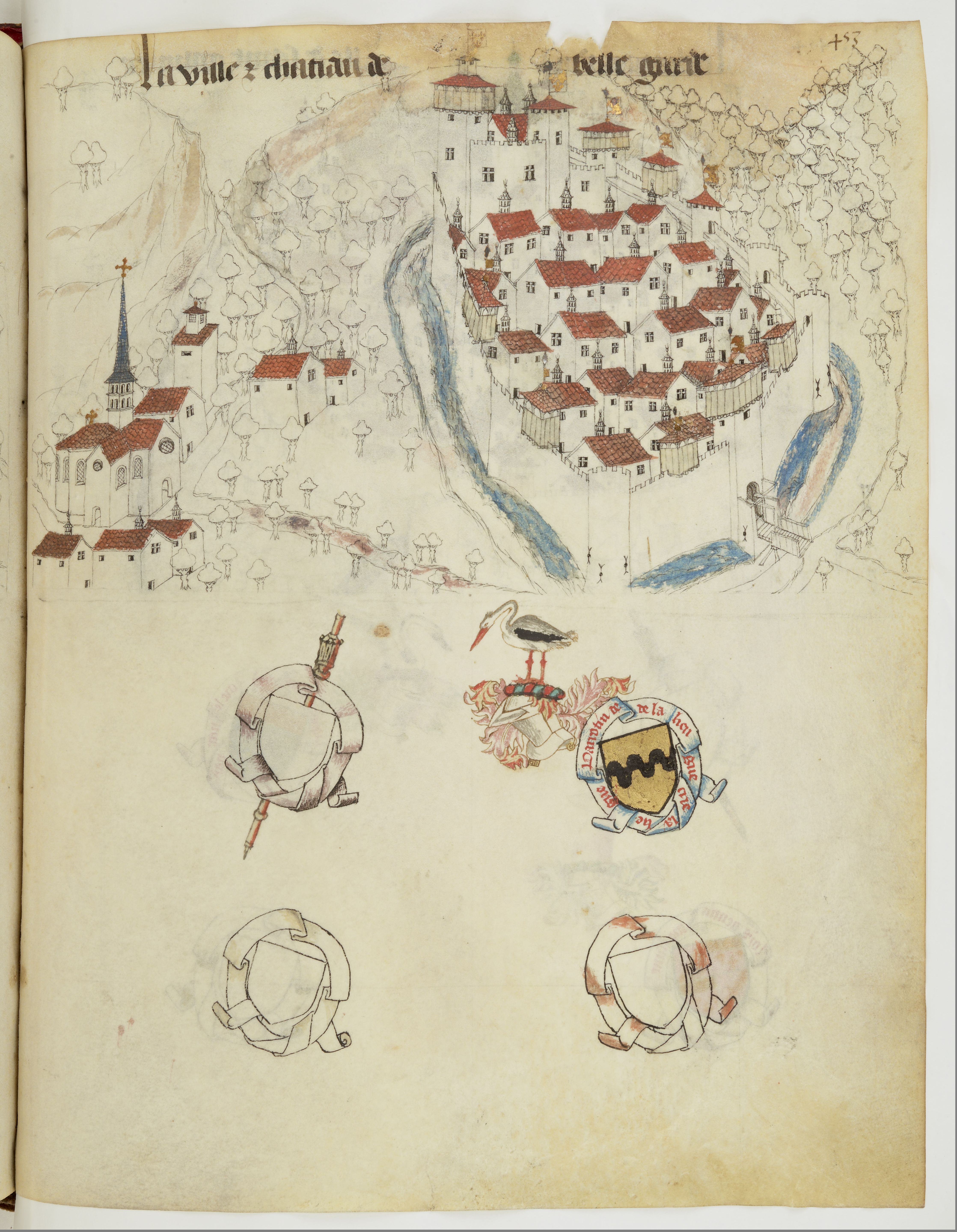 in Armorial d'Auvergne, pages présentant des chateaux, villes et blasons.